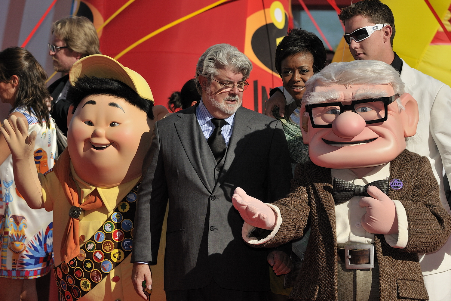 66ème Festival du Cinéma de Venise (Mostra), 5ème jour (06/09/2009) Geaorges Lucas et les réalisateurs de Pixar receoivent un Lion d'Or pour l'ensemble de leur carrière : John Lasseter (Toy Story, 1001 Pattes, Cars...), Brad Bird (Les Indestructibles, Ratatouille), Pete Docter (Monstres et Cie, Là-haut), Andrew Stanton (Le Monde de Nemo, WALL•E) et Lee Unkrich (Toy Story 2, Monstres et Cie, Le Monde de Nemo)